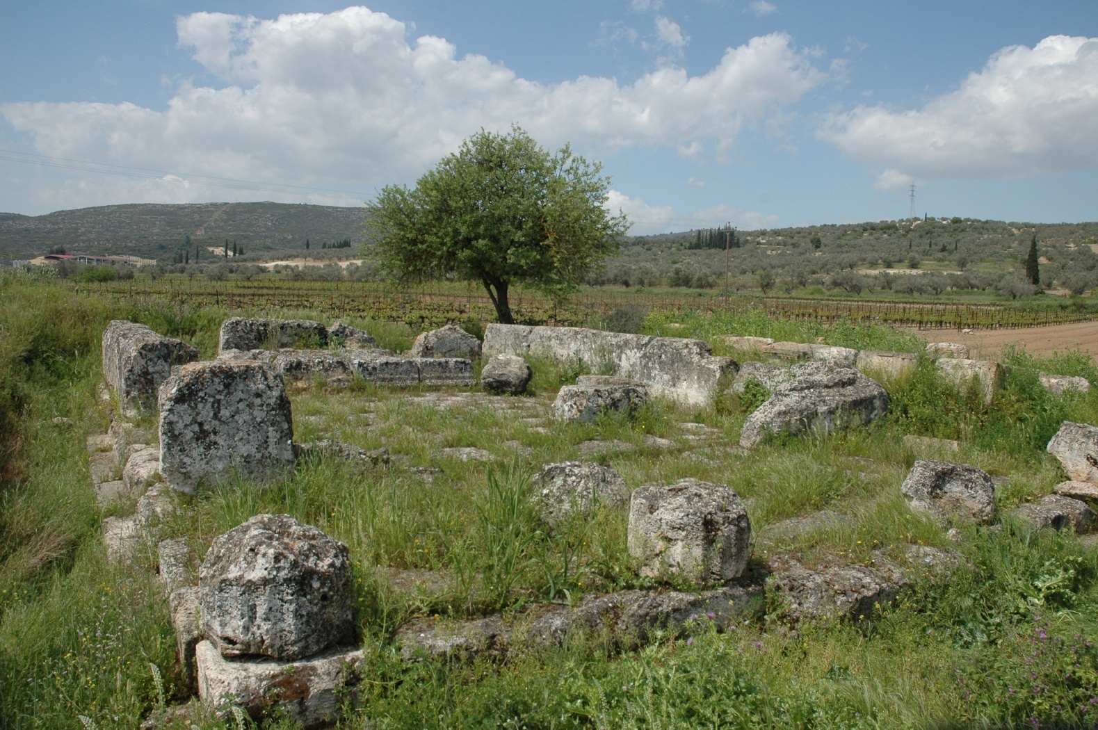 Tempel des Herakles in Kleonai.